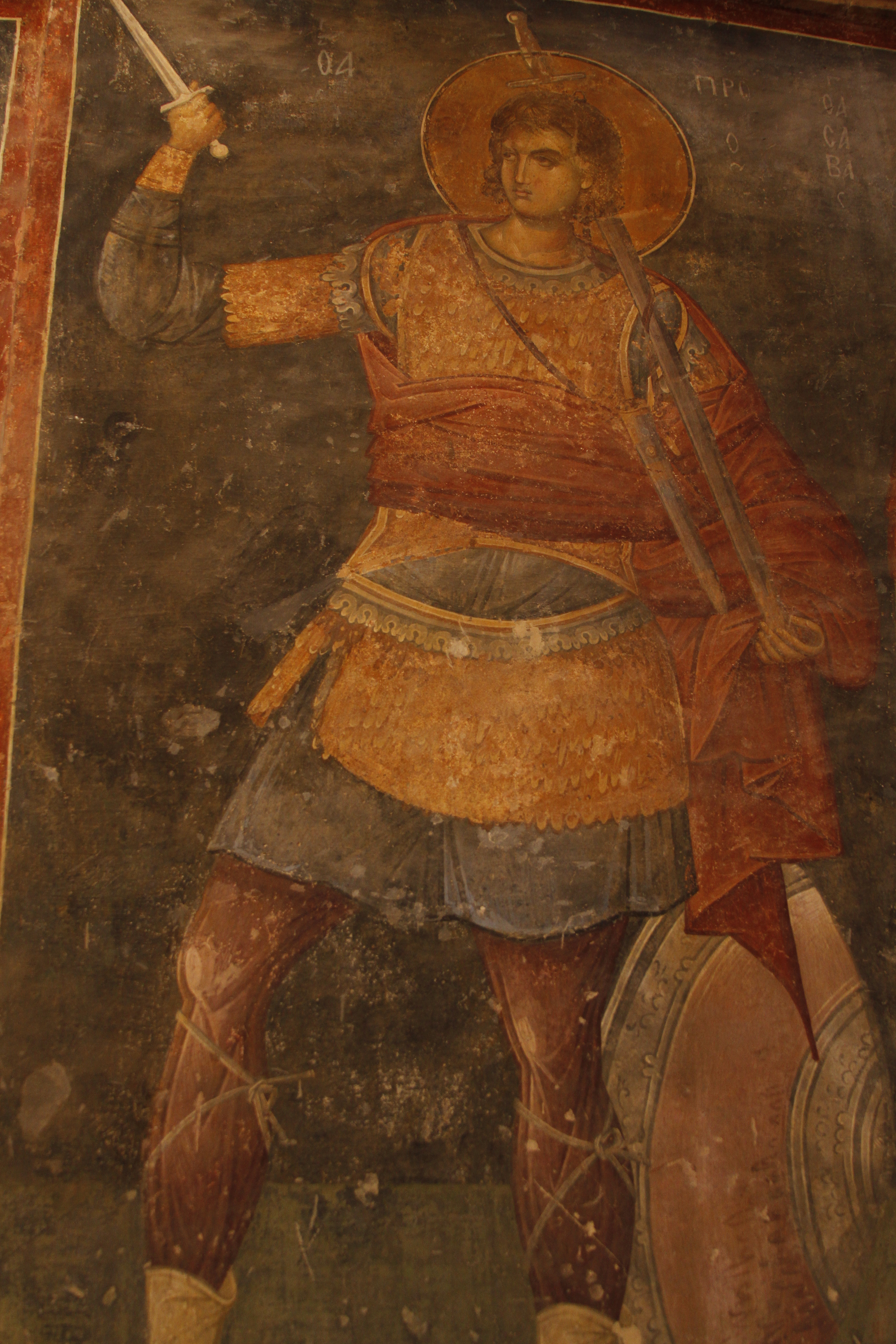 São Procópio (Saint Procopius).